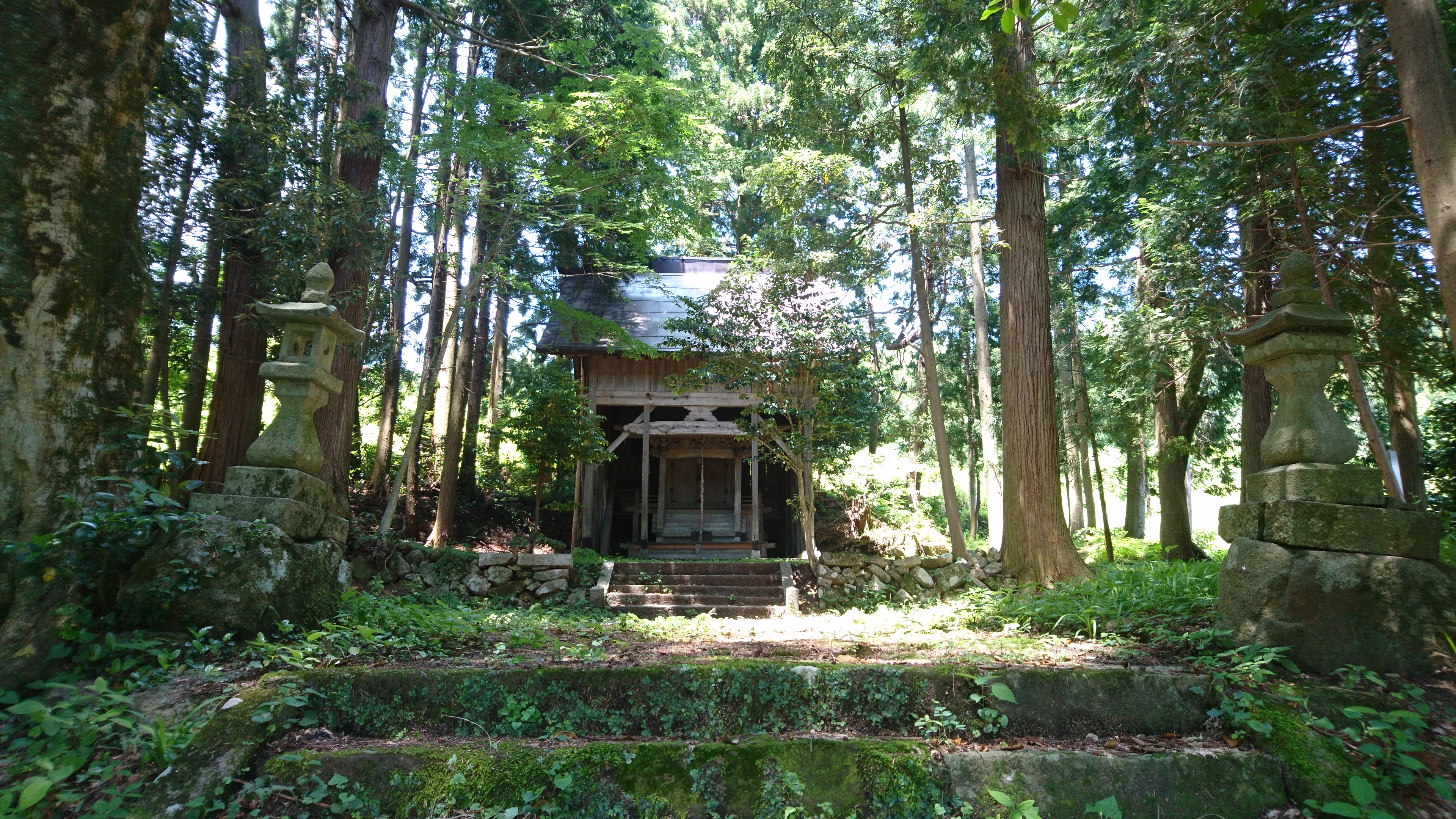 世屋姫神社（宮津市世屋地区）